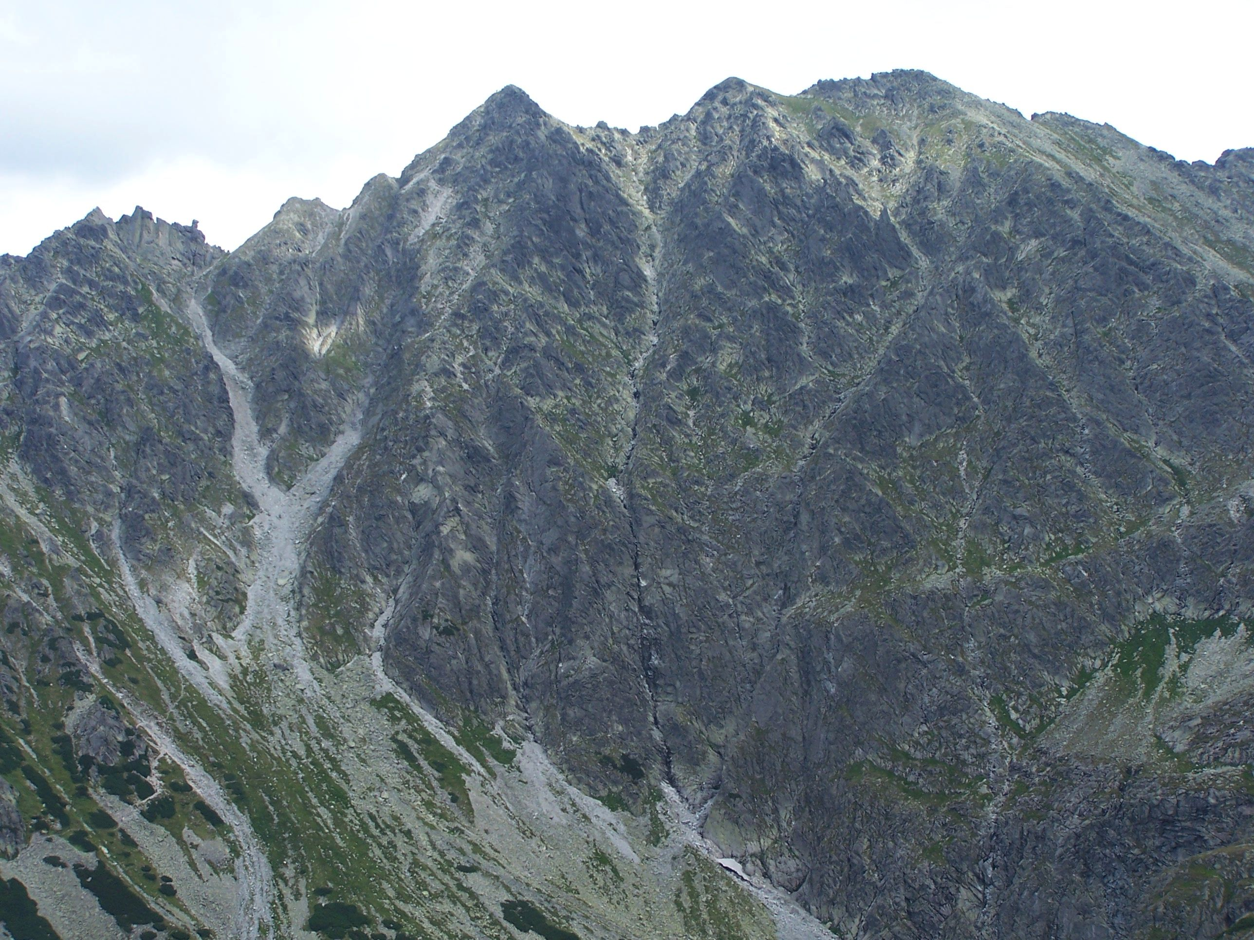 Granaty (Tatra Mountains). Widok z Kościelca